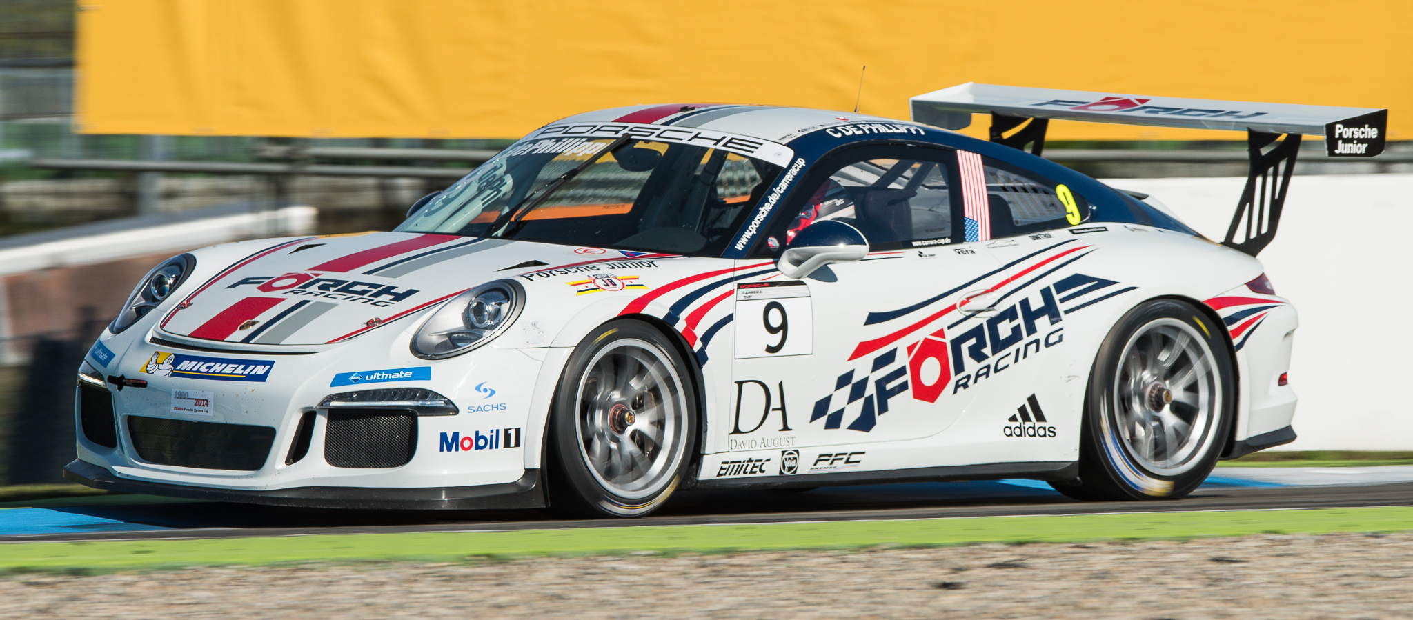 Connor De Phillippi,Förch Racing by Lukas Motorsport,Hockenheimring,Motorsport,Porsche 911 GT3 Cup (Typ 991),Porsche Carrera Cup Deutschland